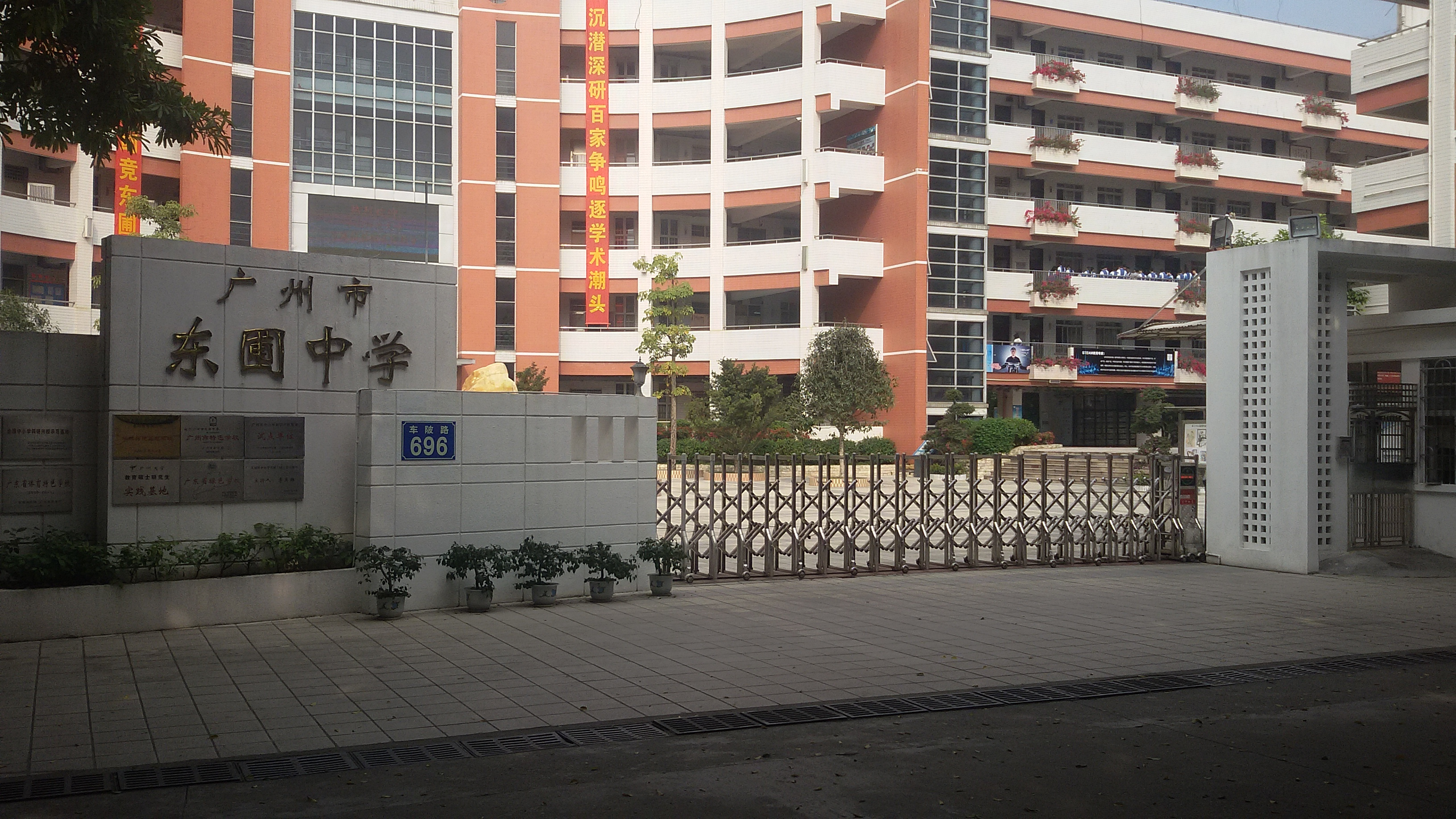 粵語: 廣州市東圃中學（高中部）